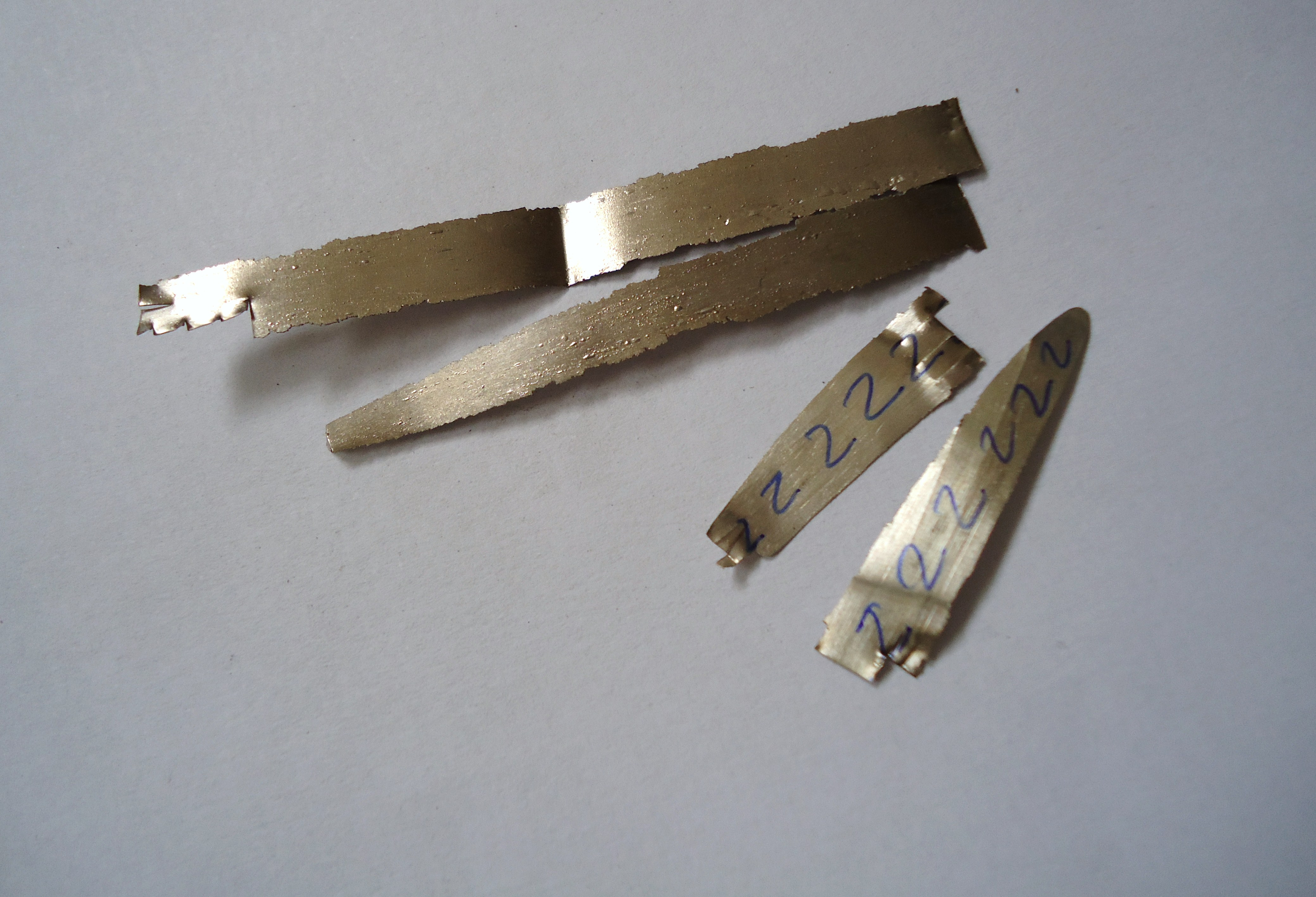 Soldas para ouro branco. Autor: Mauro Cateb, joalheiro brasileiro. Unknown